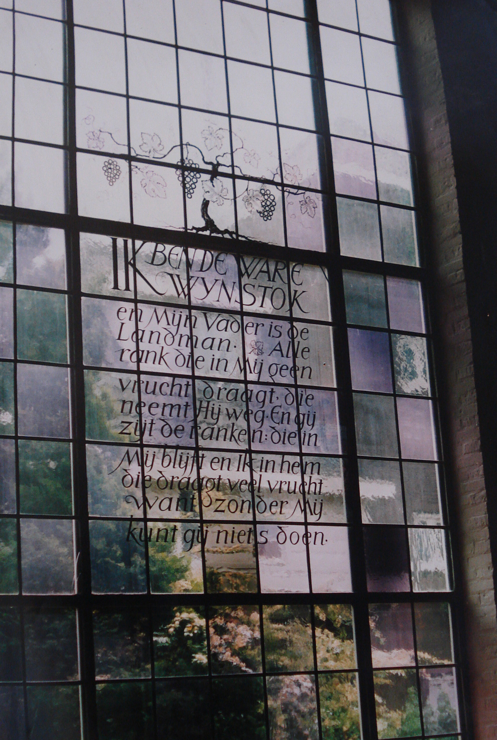 Raam in de Dommelhoefkerk